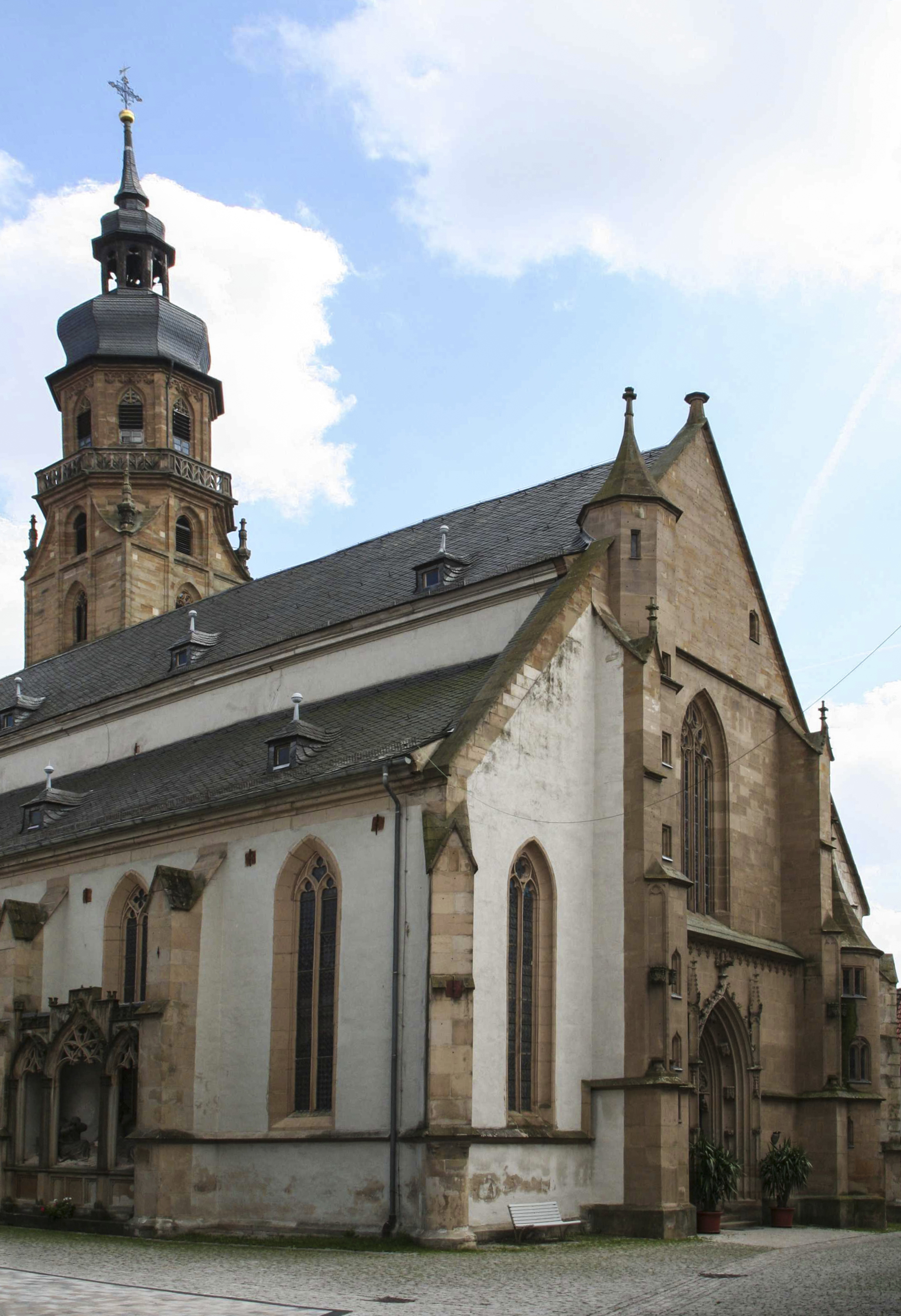 Stadtpfarrkirche Mariä Himmelfahrt, Bad Königshofen im Grabfeld im Landkreis Rhön-Grabfeld in Bayern